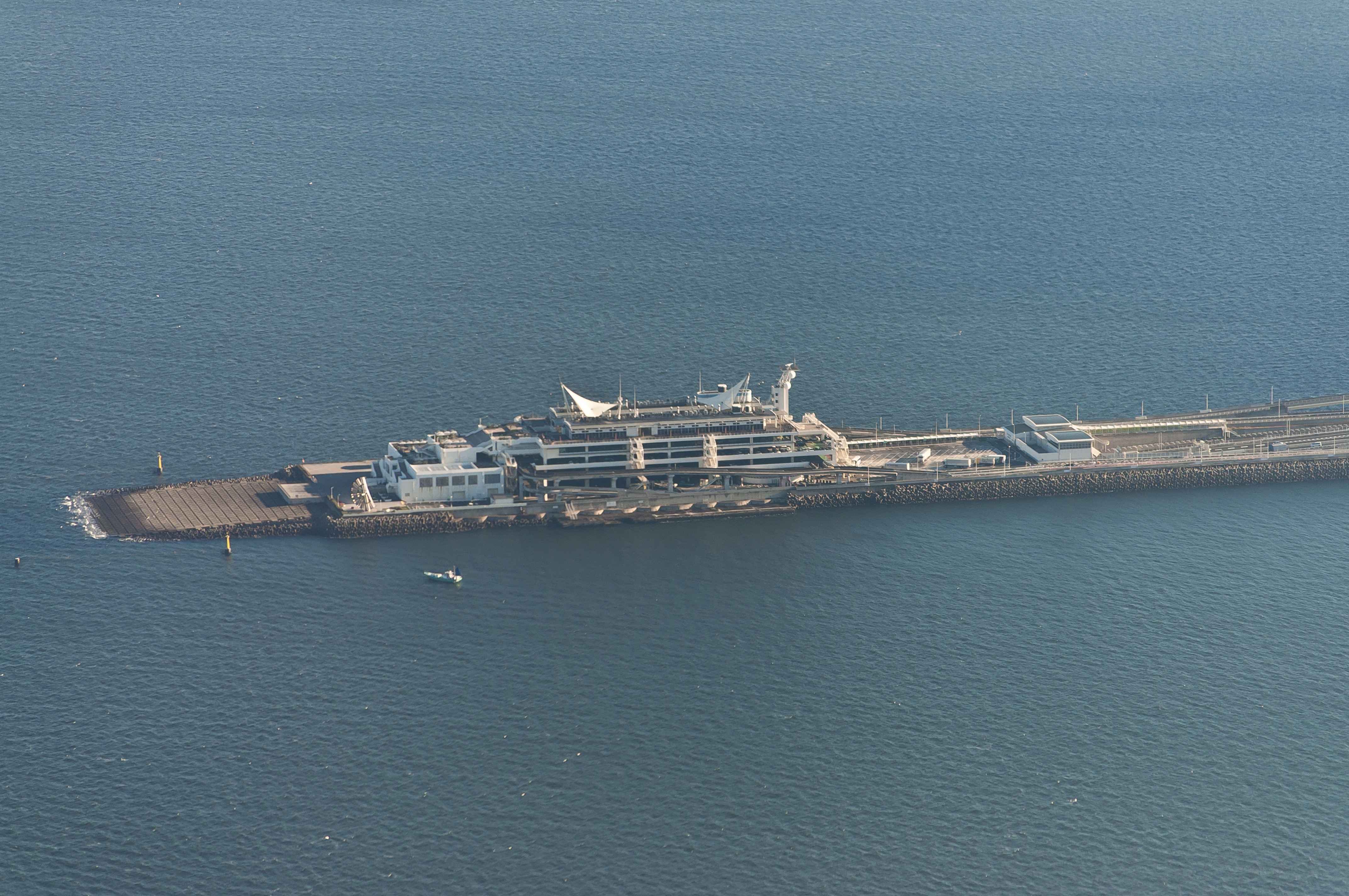 海ほたるパーキングエリアの空撮画像。羽田空港へ向けて降下中の旅客機の機内から投稿者が撮影。